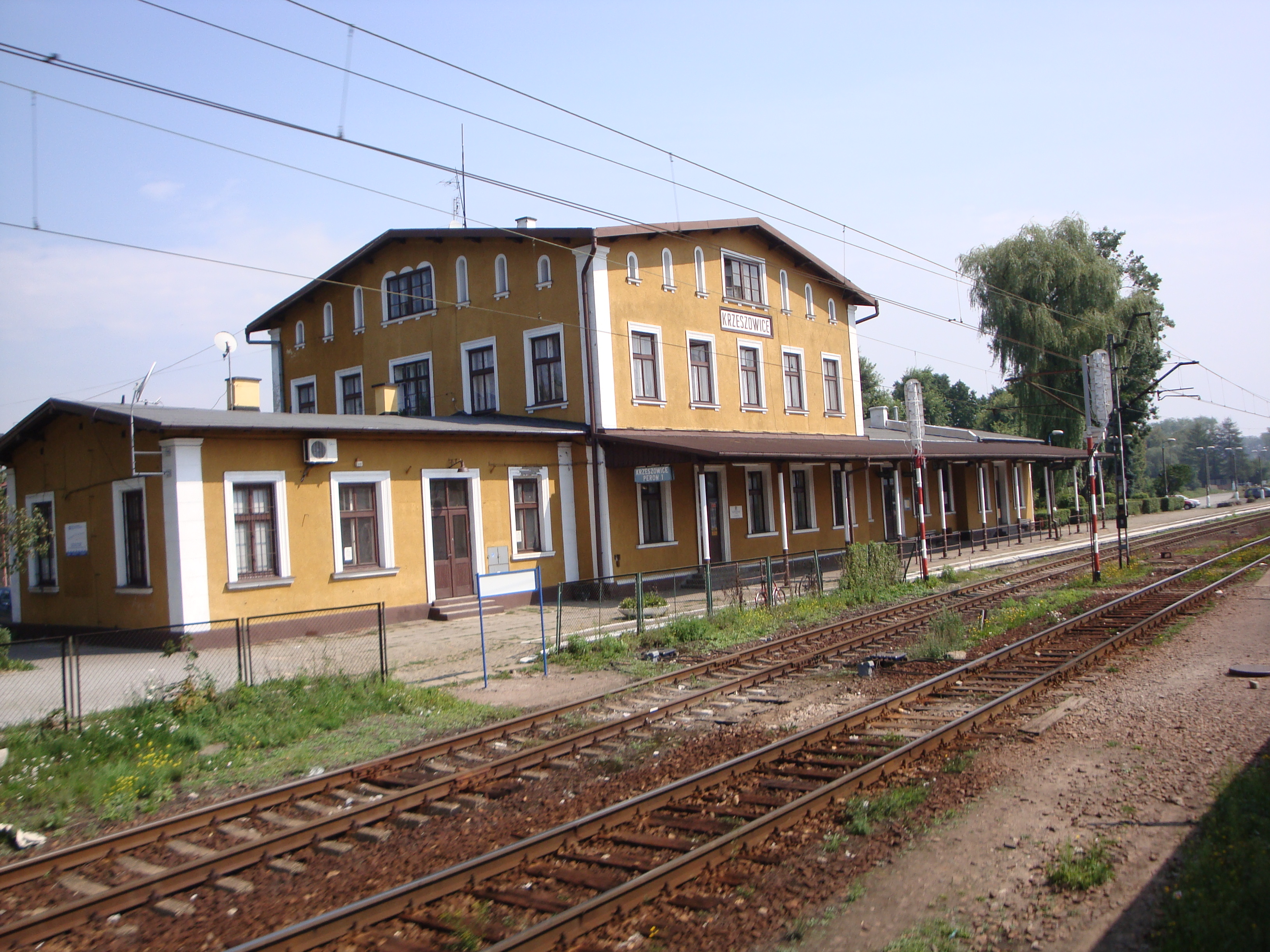 Budynek dworca w Krzeszowicach.